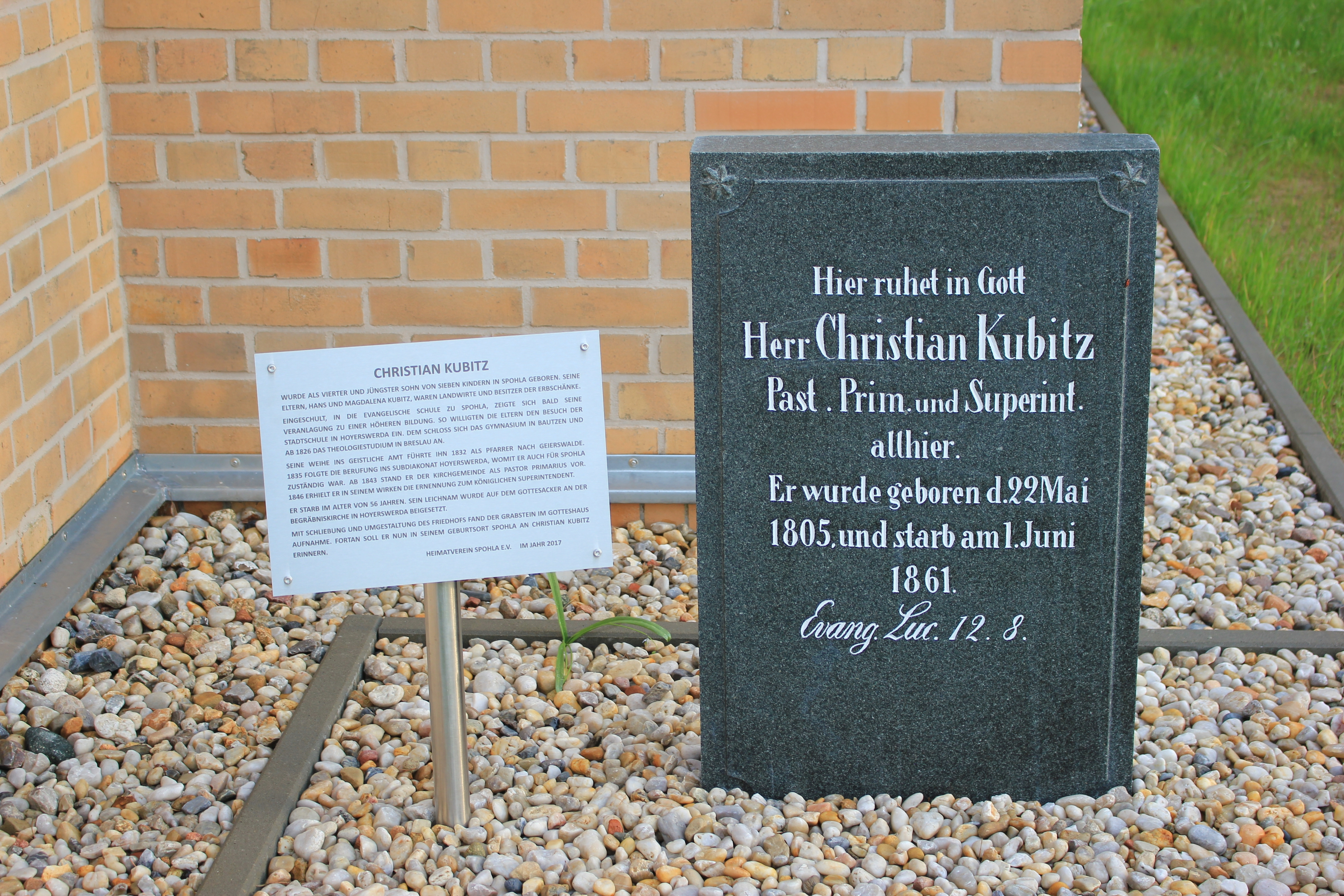 Hornjoserbsce: Narowny kamjeń Křesćana Kubicy na Spalowskim kěrchowje.